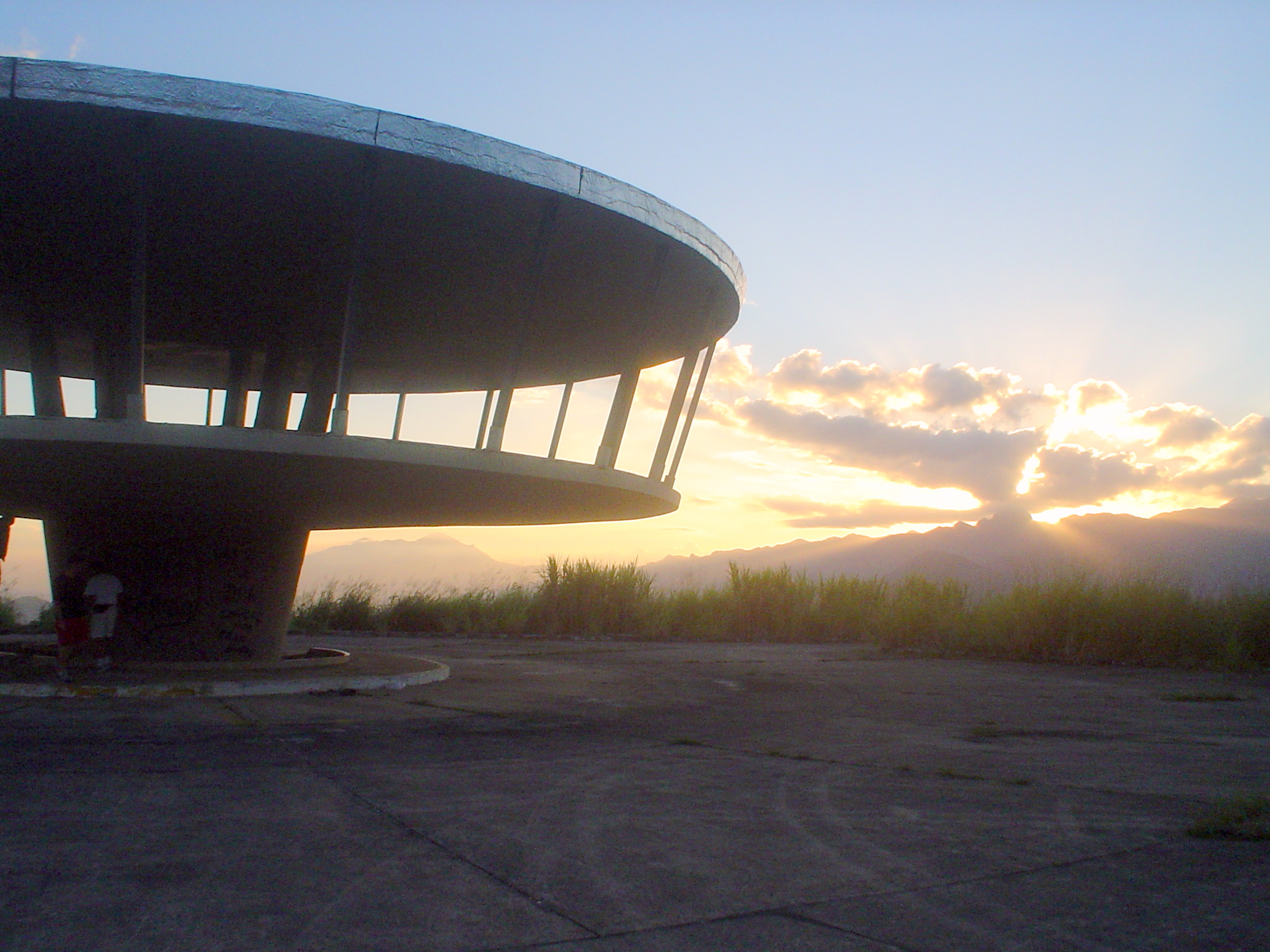 Belvedere do Grinfo. O famoso Belvedere (ou mirante) da BR-040, localizado entre Petrópolis e Xerém, no Rio de Janeiro. Neste local funcionava o antigo Restaurante Disco, que já foi fechado há muitos anos. É também conhecido como o "Disco Voador" da BR-040. Além deste, também existe um outro mirante na BR-040, localizado em Juiz de Fora (MG).